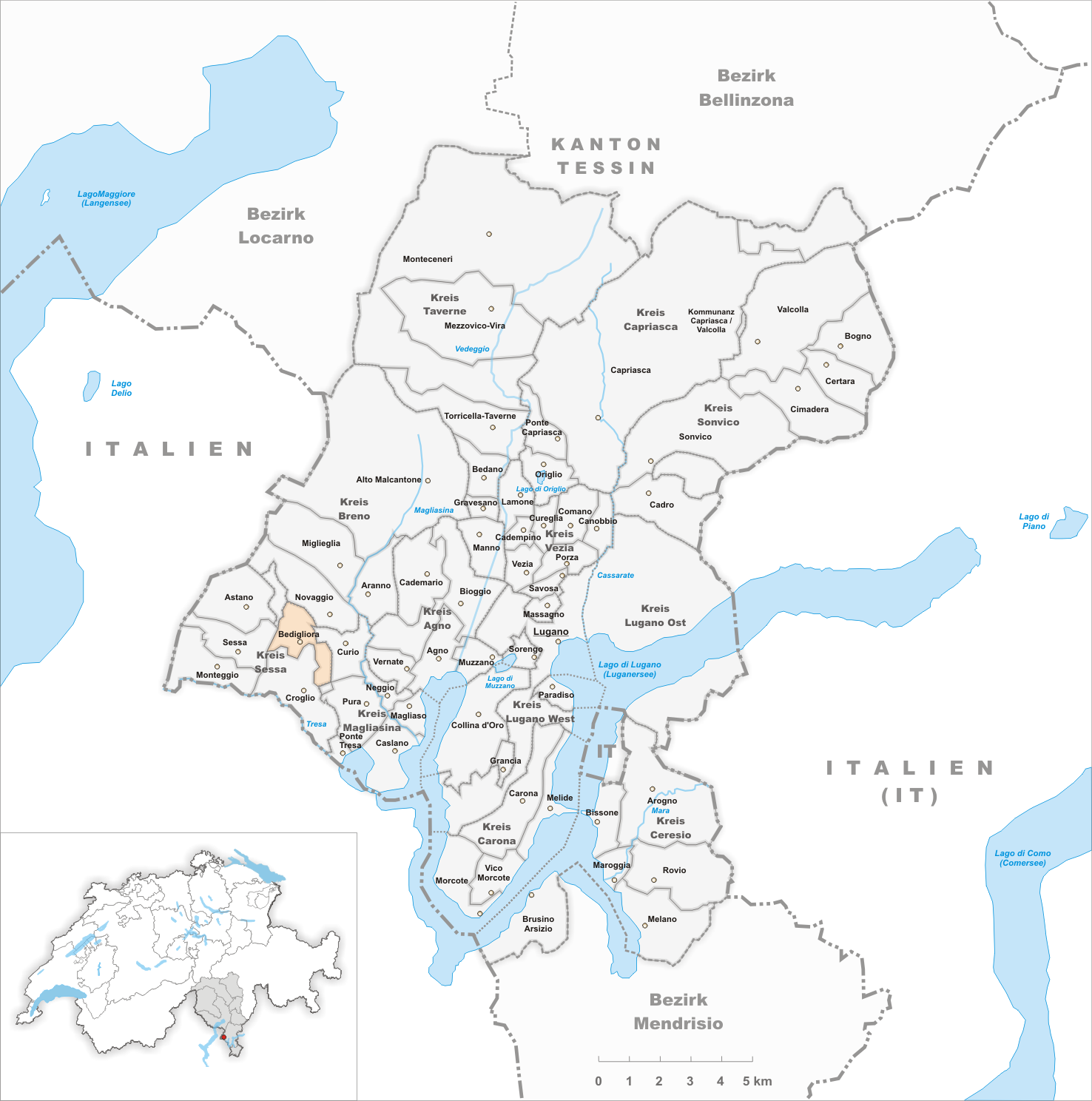 Municipality Bedigliora